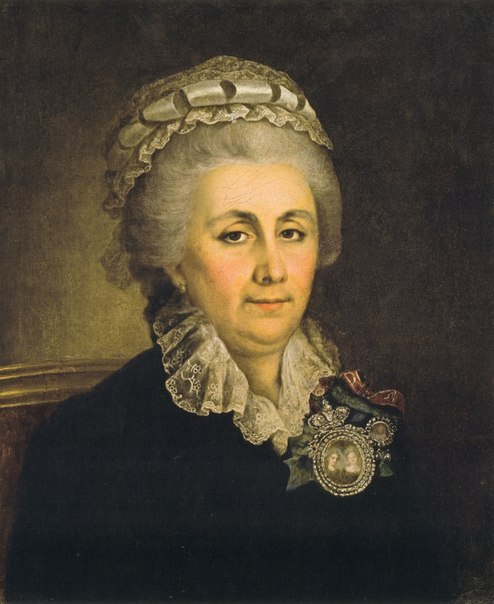 Евдокия Ильинична Голенищева-Кутузова, ур. Бибикова (1743—1807), статс-дама.